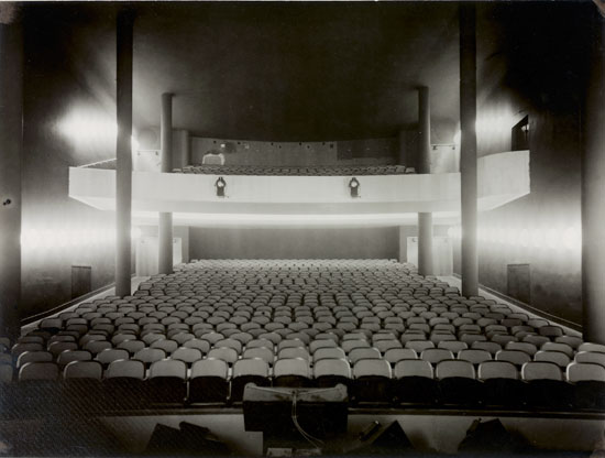 Salongen i biografen "Flamman" i Stockholm